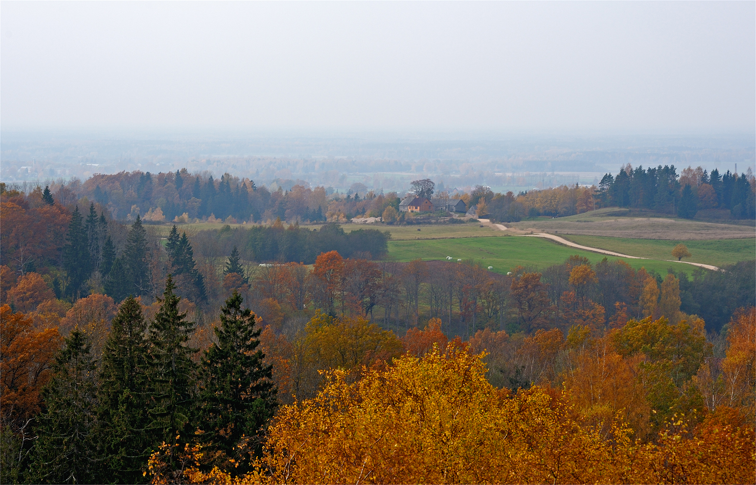 "Осень, мне бы прочь от земли..."